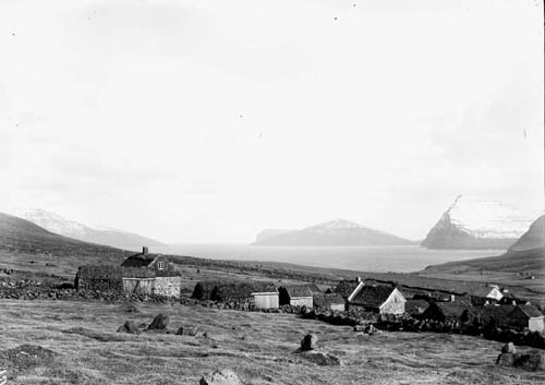 Viðareiði við Garð, Faroe Islands